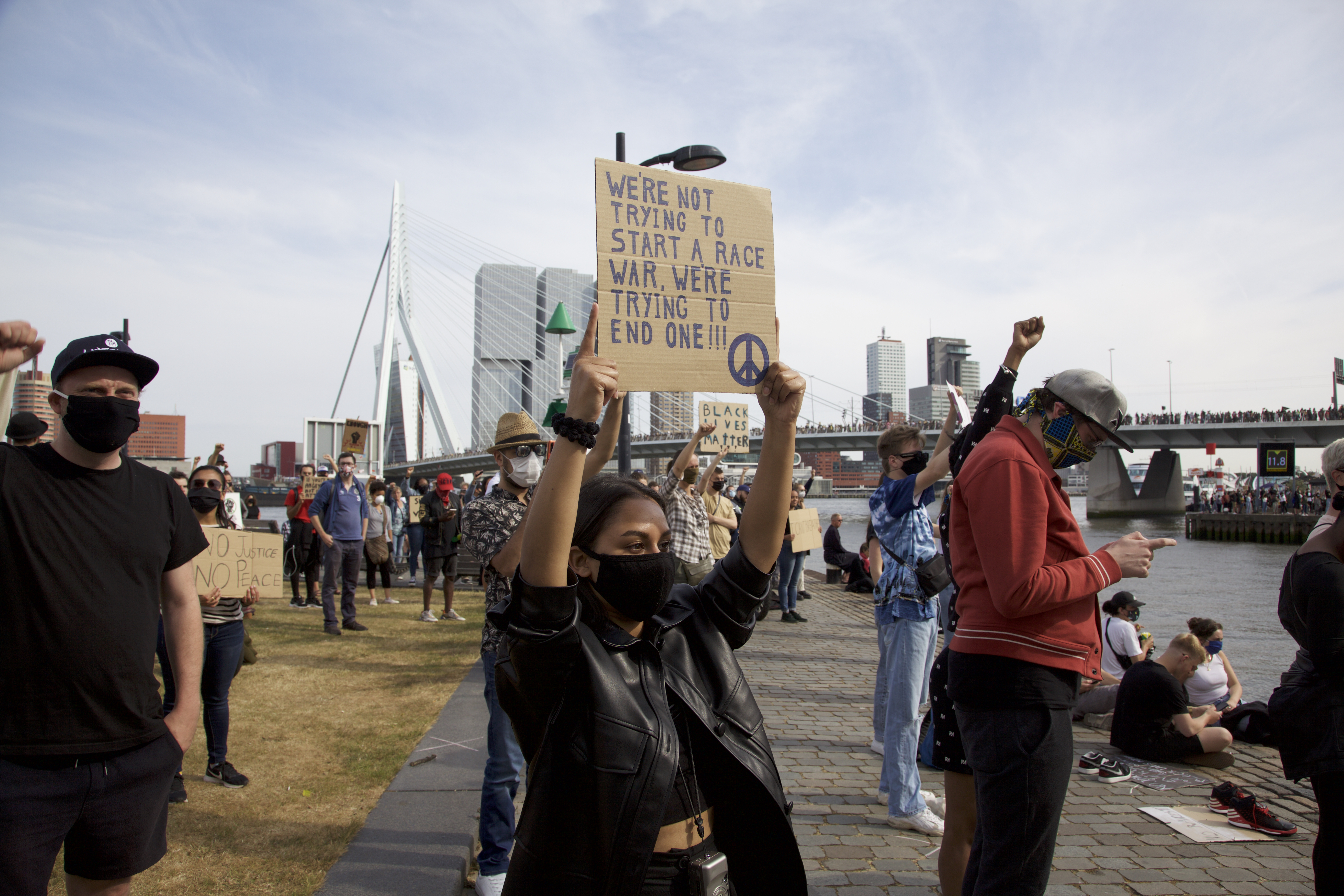 Black Lives Matter demonstratie, Rotterdam.